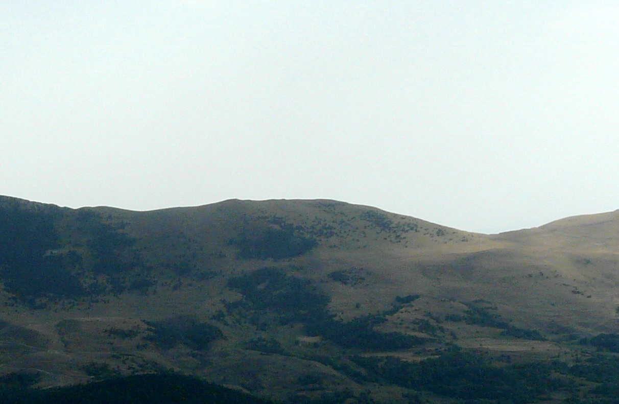 El puig de Coma d'Olla vist de la cara nord, des de la pista de Pardines a Tregurà. A la dreta (fora de la imatge) quedaria el puig de la Portella d'Ogassa i a l'esquerra Puig Estela.